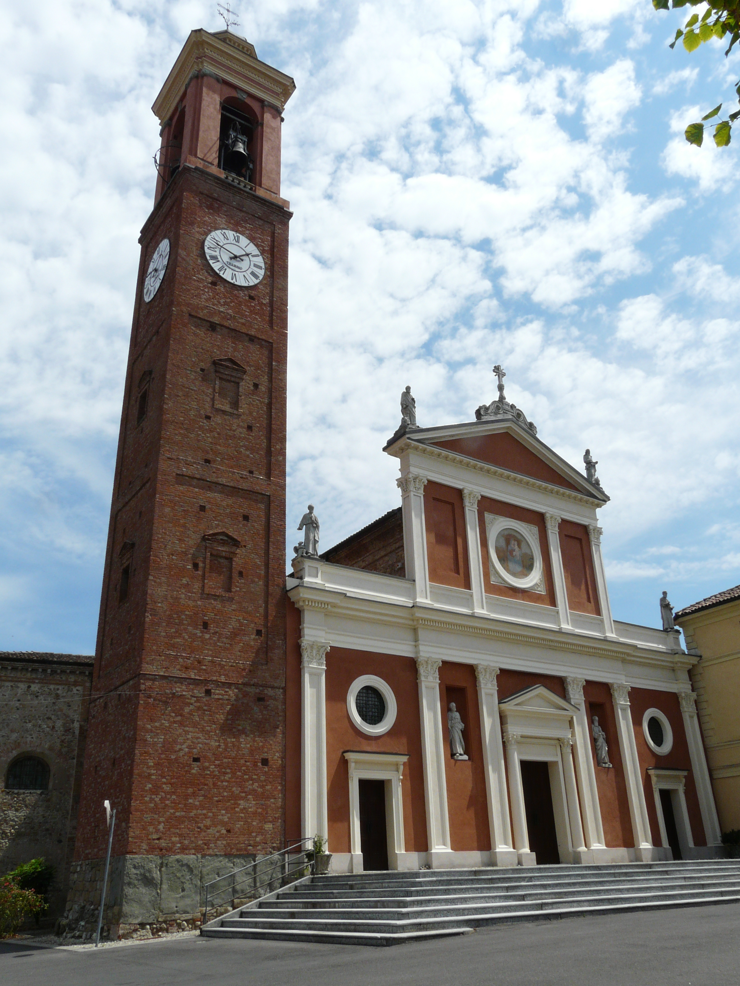 Chiesa di San Germano, Rivanazzano Terme, Lombardia, Italia